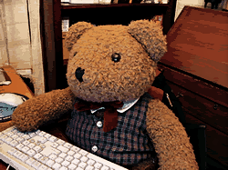 Usuario JorgeGG. Oso de peluche con chaleco a cuadros y con la zarpa en un teclado de ordenador